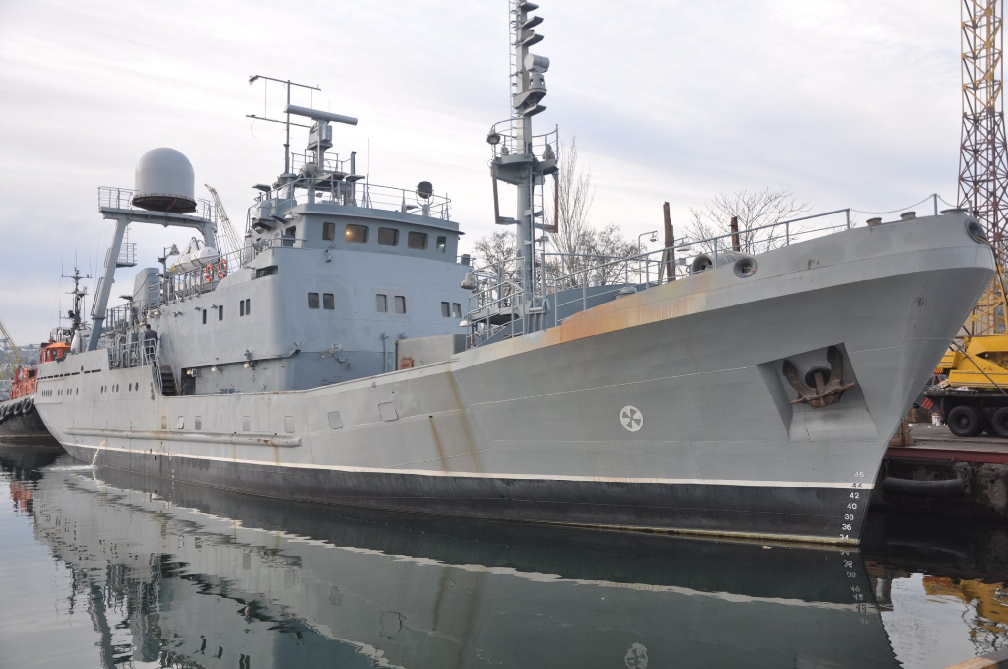 30 січня від стінки заводу Україна м. Одеса в море вийшов корабель спланований для передачі Військово-Морським Силам ЗС України. Метою виходу було проведення частини заводських ходових випробувань. Про повідомляє Пресцентр ВМС. Корабель було закладено на заводі «Кузня на Рибальському» та спущено на воду 23 квітня 2019 року. На даний час корабель дообладнується на підприємстві «Судоверфь Україна». Протягом дня представники заводу разом з екіпажем виконували різноманітні завдання з перевірки якості роботи механізмів та агрегатів корабля відповідно до запланованого графіку. Зі слів заступника генерального директора з виробництва заводу «Кузня на Рибальському» Олександра Вишневецького — корабель виконав поставлені завдання відповідно до запланованої програми. Всі заходи випробувань проведені. За підсумками випробування недоліків в роботі механізмів не виявлено. Екіпаж позитивно оцінив можливості корабля.